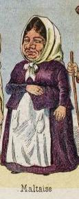 Huit personnages alignés représentant chacun une communauté. Edition: Ed. Bab-el-Oued Inscriptions: Napolitaine/ Nègre/ Mozabite/ Gitana/ Arabe/ Maltaise/ Gitane/ Vieille Juive La carte parodie la représentation des "types" de populations algériennes, largement présente dans l'estampe, la photographie et la carte postale. Dimensions : H. 10,0 - L. 14,0 cm Impression photomécanique